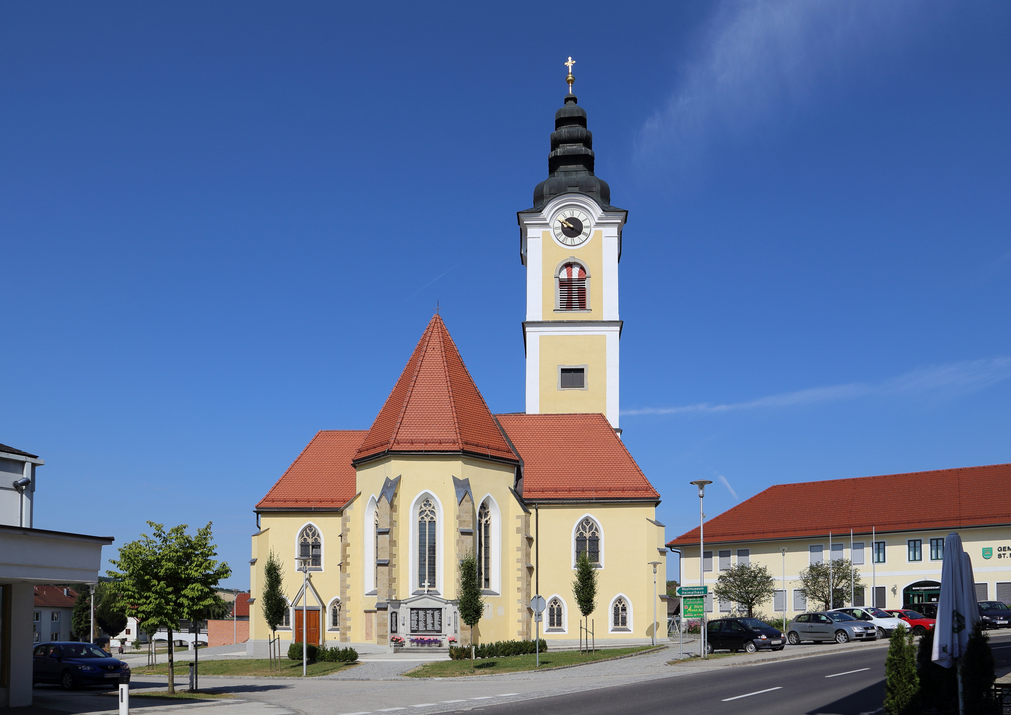 Katholische Pfarrkirche zur Himmelfahrt Mariä in der oberösterreichischen Marktgemeinde St. Marienkirchen an der Polsenz. Eine im Kern gotische Kirche mit einem dreischiffigen Langhaus und einem eingezogenen Chor. Der Turm in nördlichen Chorwinkel wurde 1721 im barocken Stil ausgebaut.